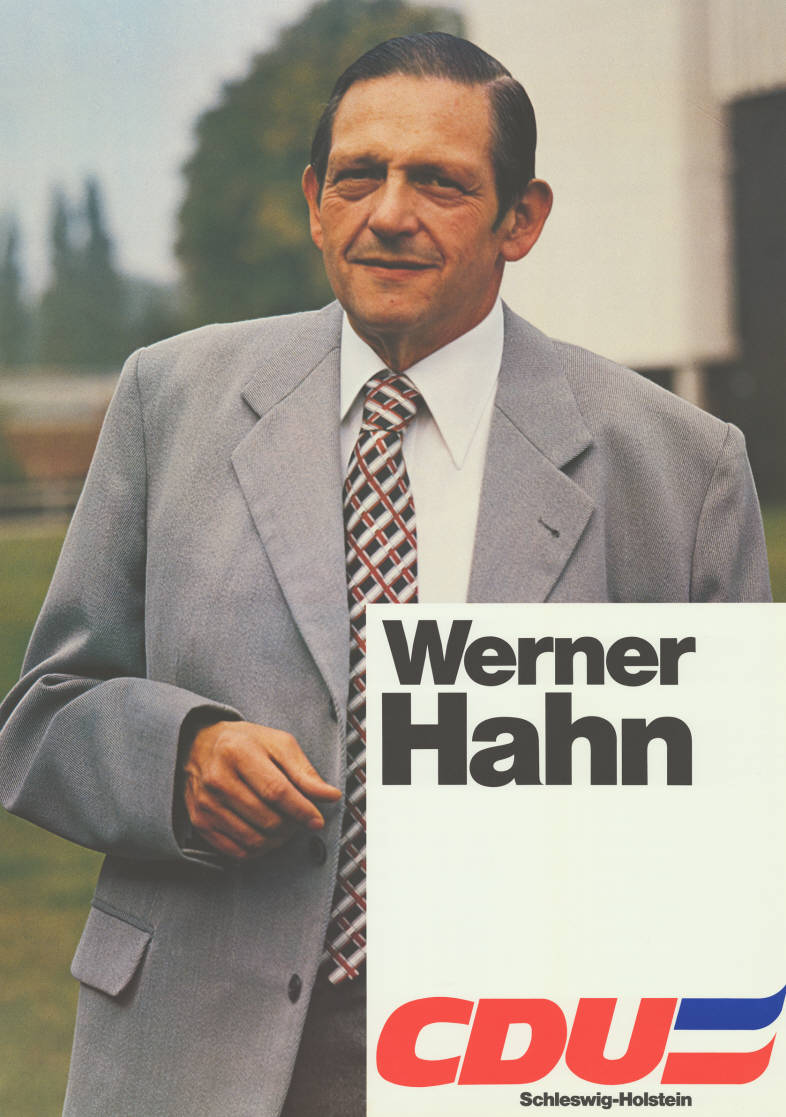 Werner Hahn CDU Schleswig-Holstein Abbildung: Foto Plakatart: Kandidaten-/Personenplakat mit Porträt Auftraggeber: Verantw.: CDU Schleswig-Holstein Objekt-Signatur: 10-012 : 420 Bestand: Landtagswahlplakate Schleswig-Holstein (10-012) GliederungBestand10-18: Landtagswahlplakate Schleswig-Holstein (10-012) » Landtagswahl am 29.4.1979 » Ankündigungsplakate Lizenz: KAS/ACDP 10-012 : 420 CC-BY-SA 3.0 DE